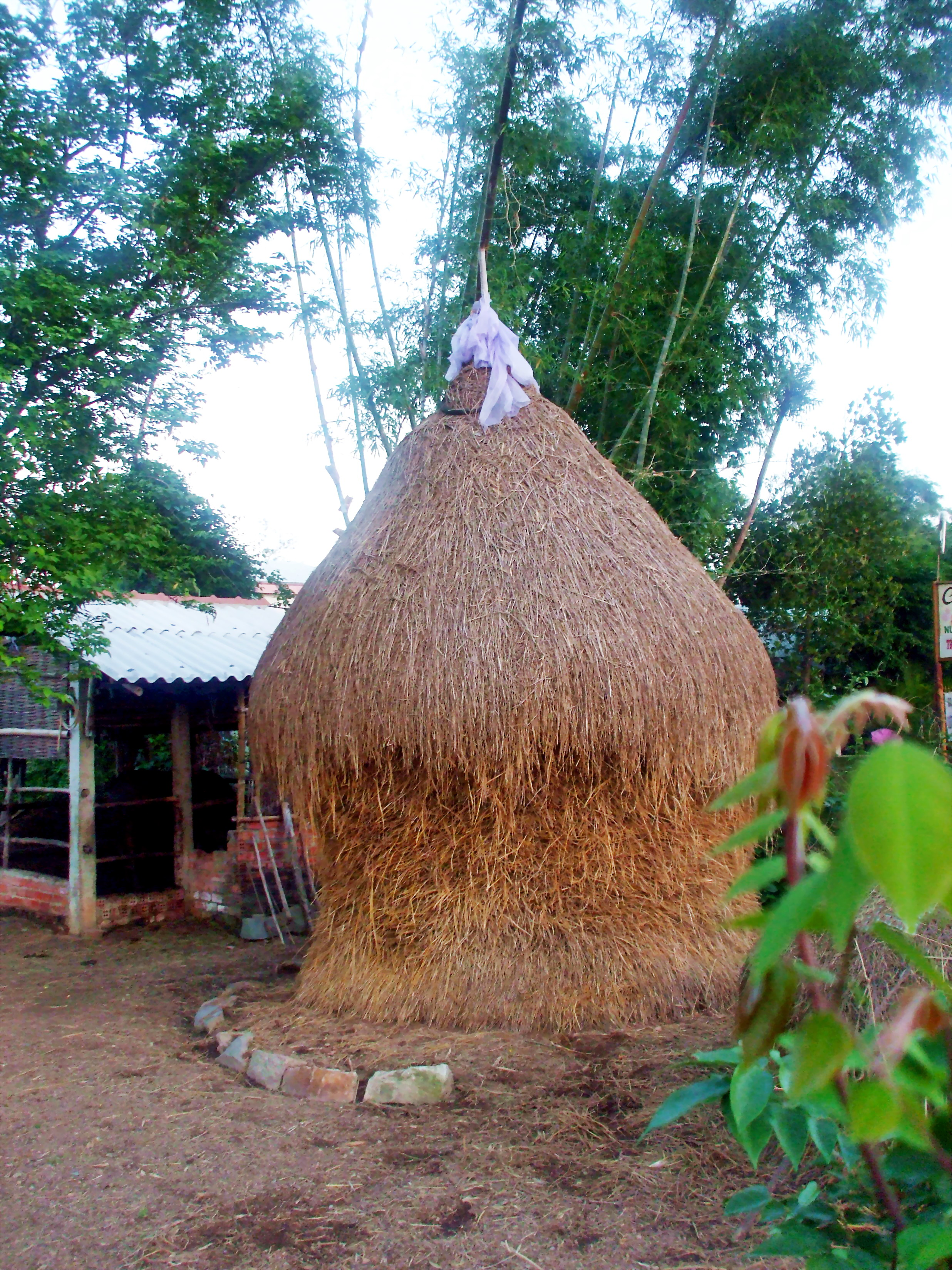 Cây rơm ở Việt Nam. Đây là một hình thức để dành rơm.